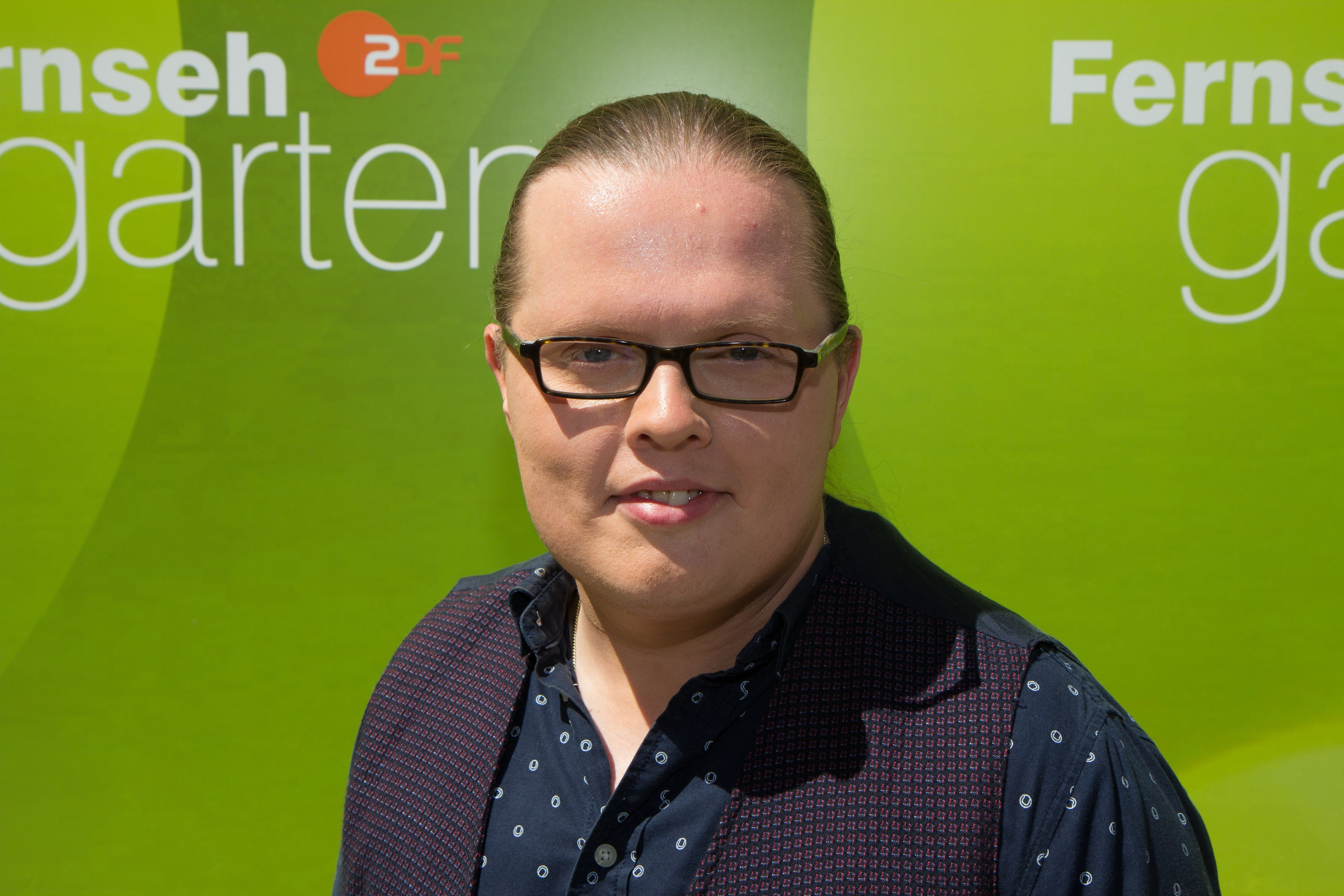 Angelo Kelly als Gast beim ZDF-Fernsehgarten am 3. Juni 2018 in Mainz.